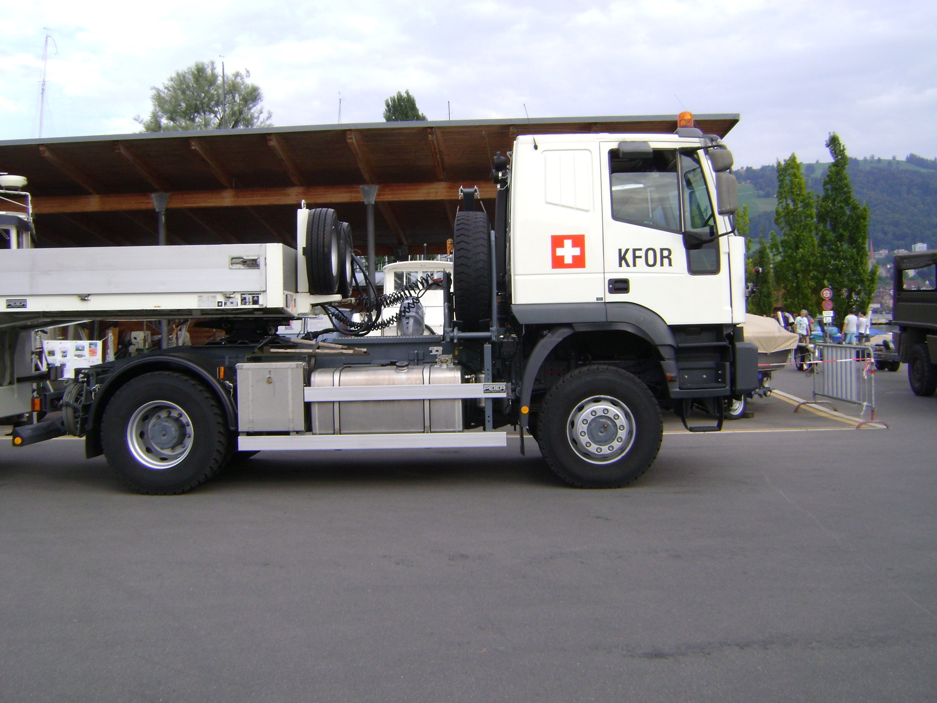 Swiss Army KFOR Truck